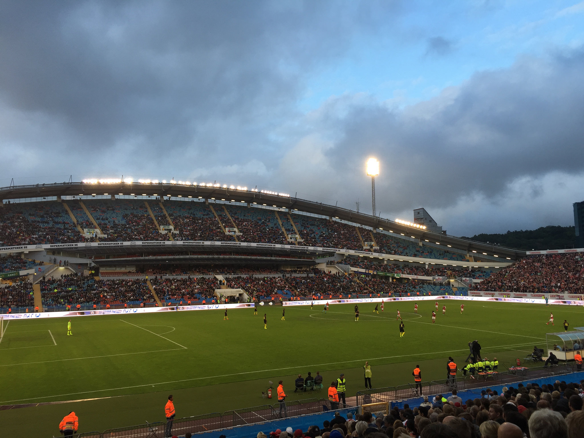 Arsenal - Manchester City på Nya Ullevi 7 augusti 2016